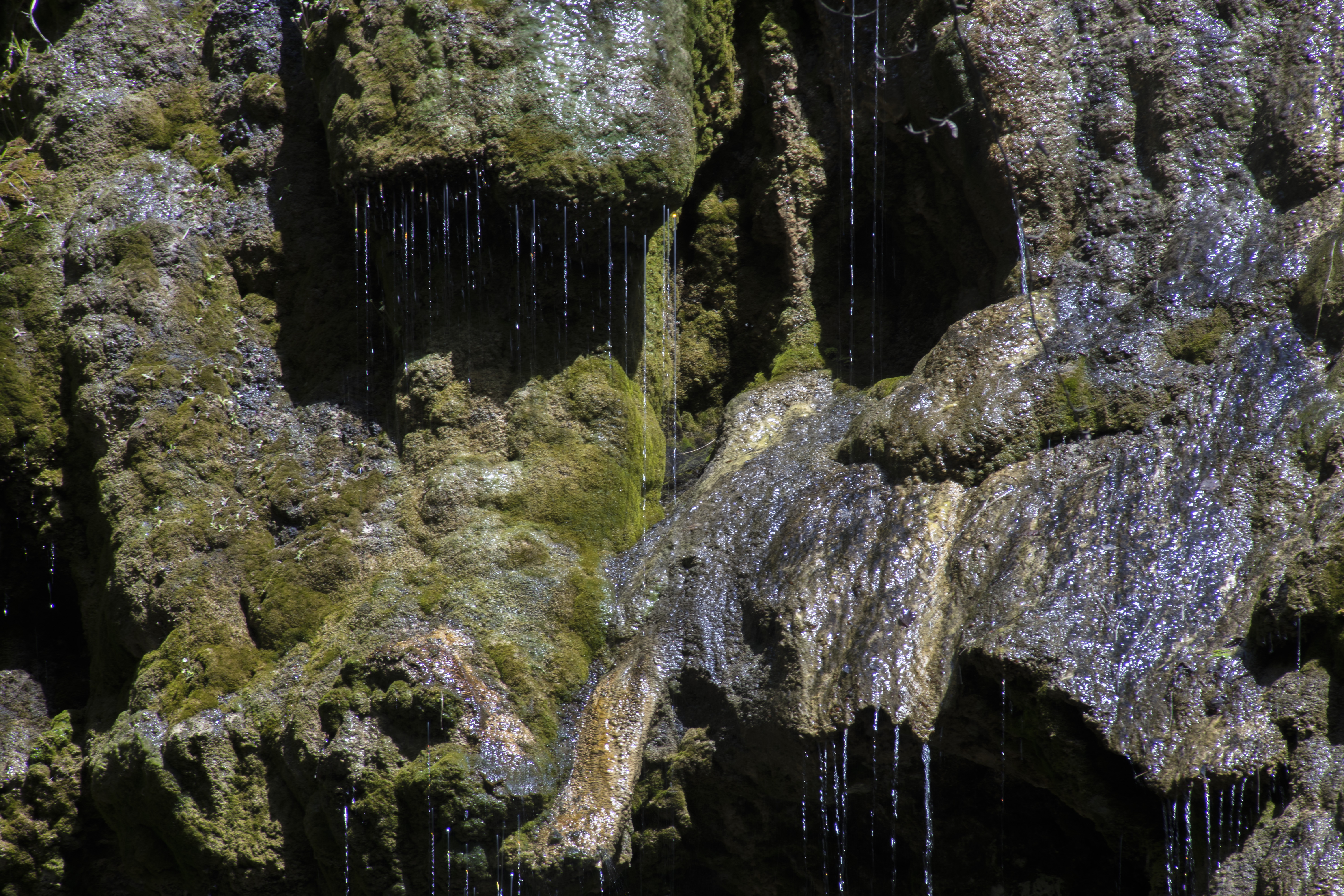 Altmoräne „Ewiger Regen“ in Maria Rain This media shows the natural monument in Carinthia with the ID KL 13.